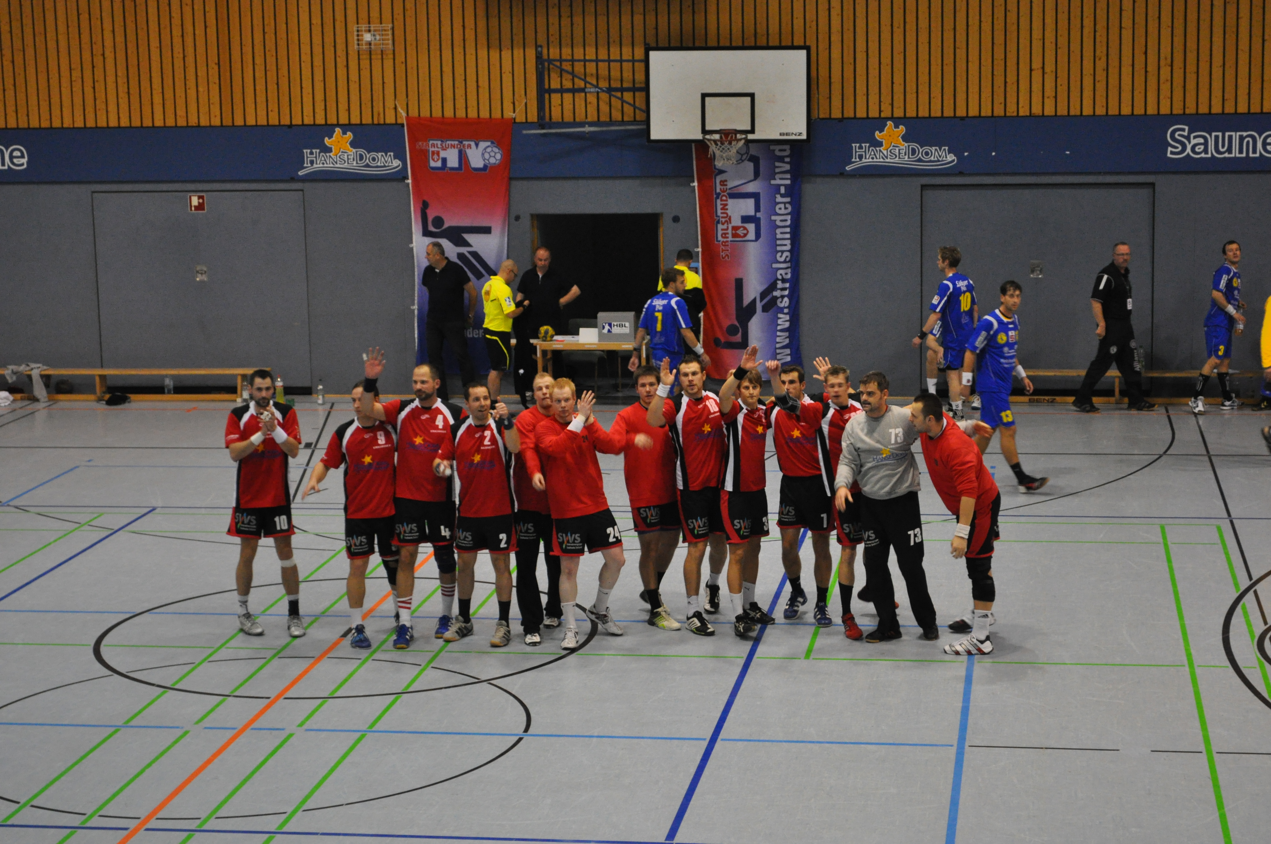 Die Mannschaft des Stralsunder HV vor dem Spiel gegen HSV Peenetal Loitz am 30. Oktober 2010 in der Vogelsanghalle Stralsund.